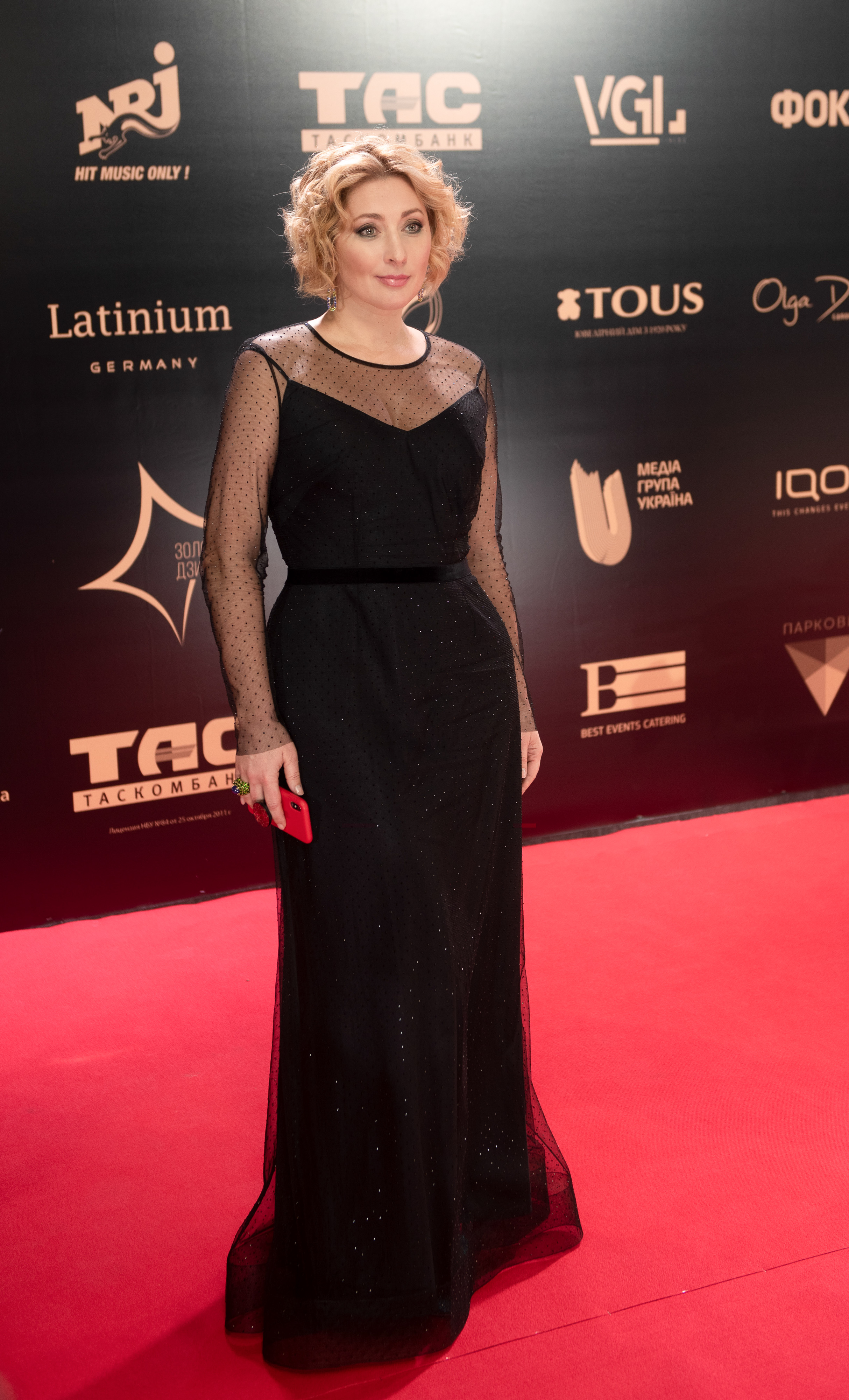 Вікторія Тігіпко на червоній доріжці Українськох кіноакадемії